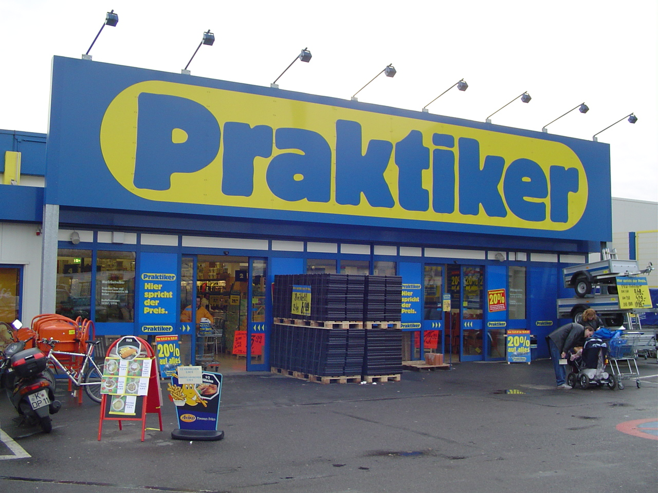 Praktiker Baumarkt, Köln-Buchheim